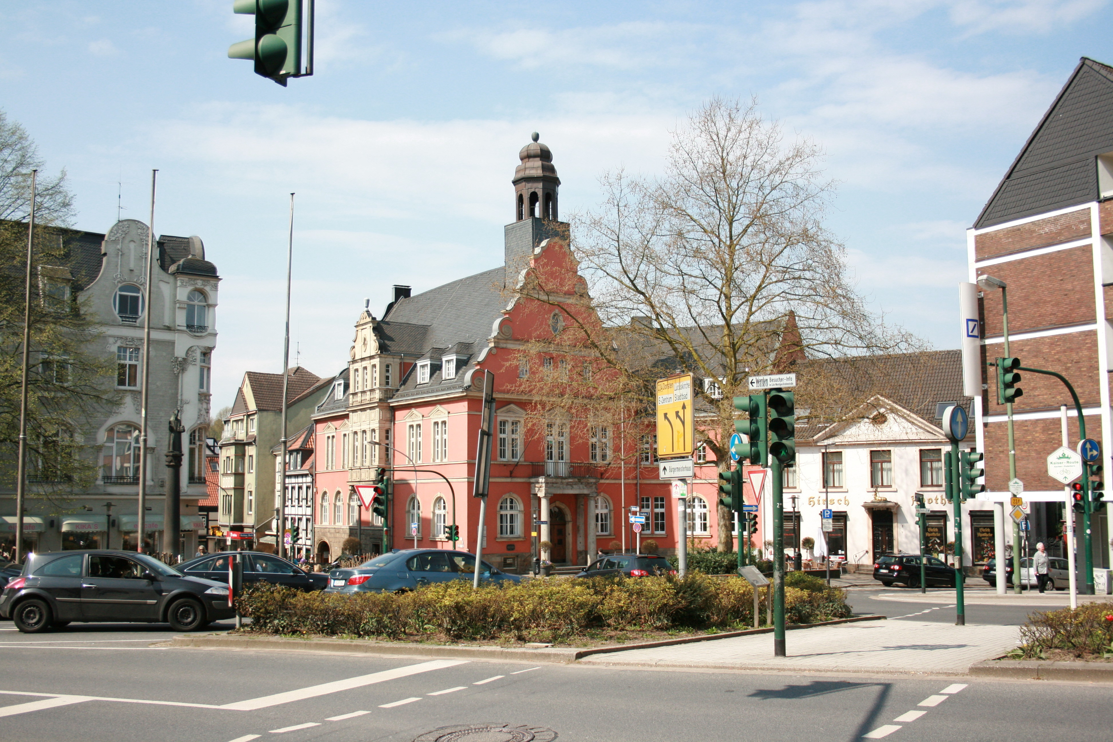 Werdener Markt in Essen-Werden